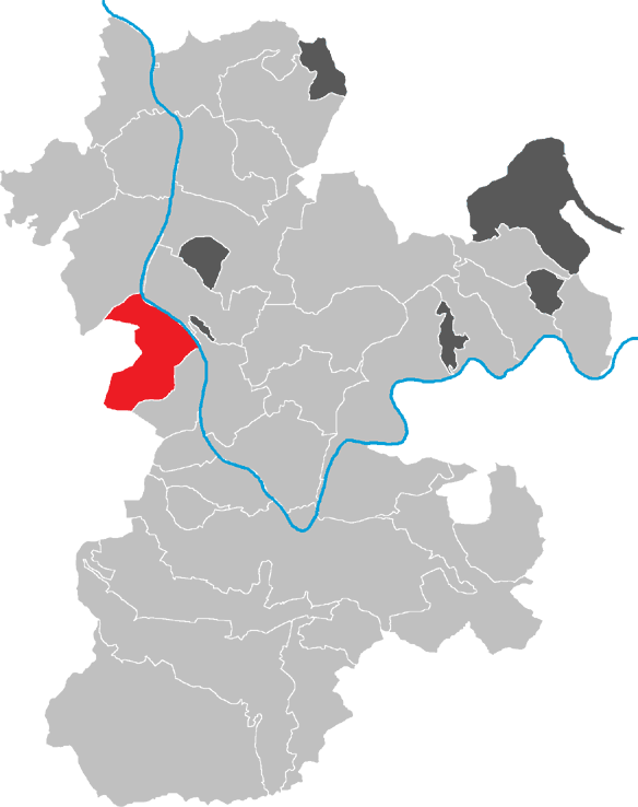 Karte von Wörth am Main im Kreis Miltenberg, Bayern, Deutschland.